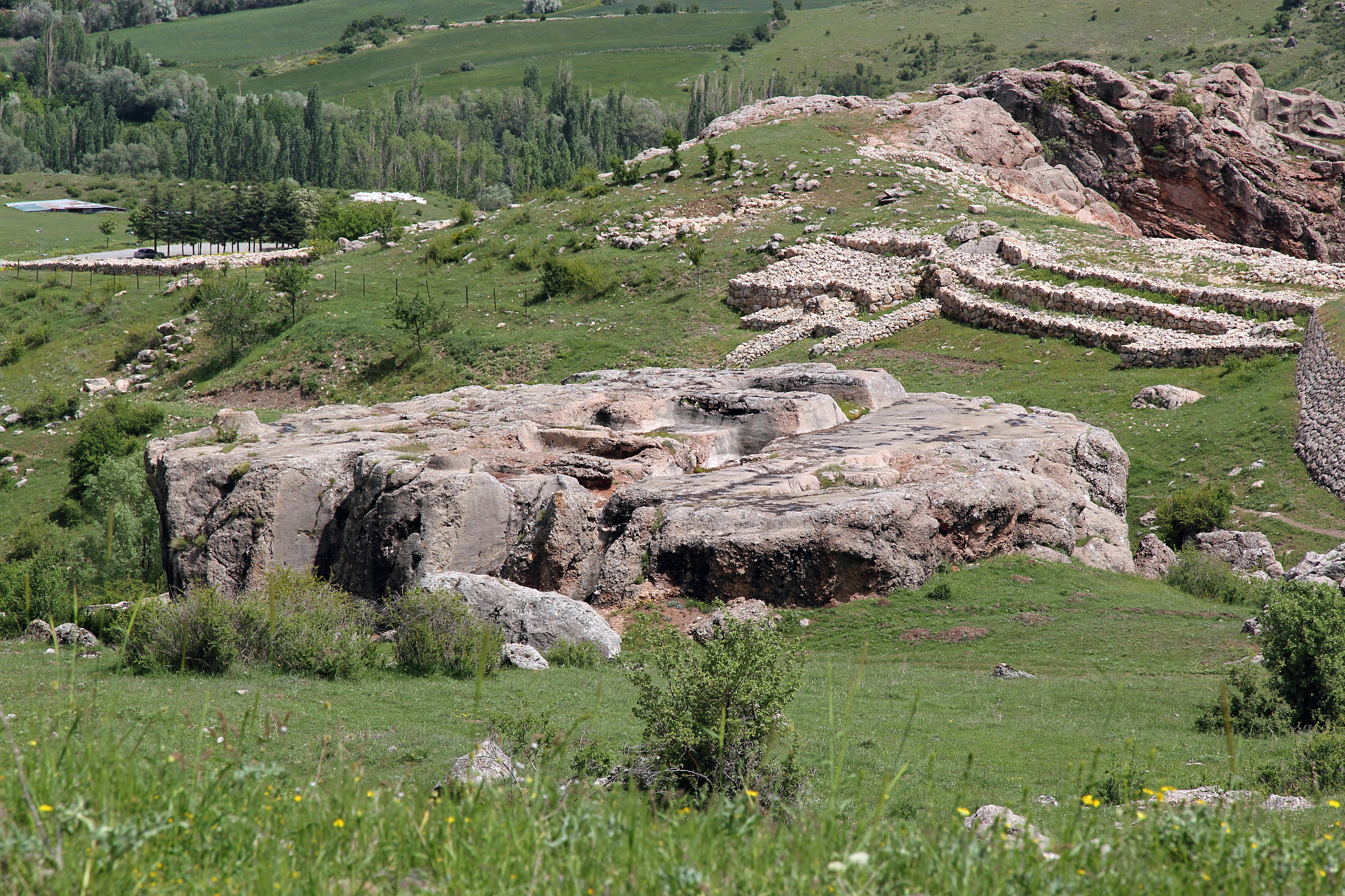 Ḫattuša, hethitische Hauptstadt bei Boğazkale, Zentraltürkei, Kızlarkayası und Kesikkaya von Südwesten